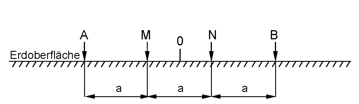 Wenner-Elektrodenanordnung